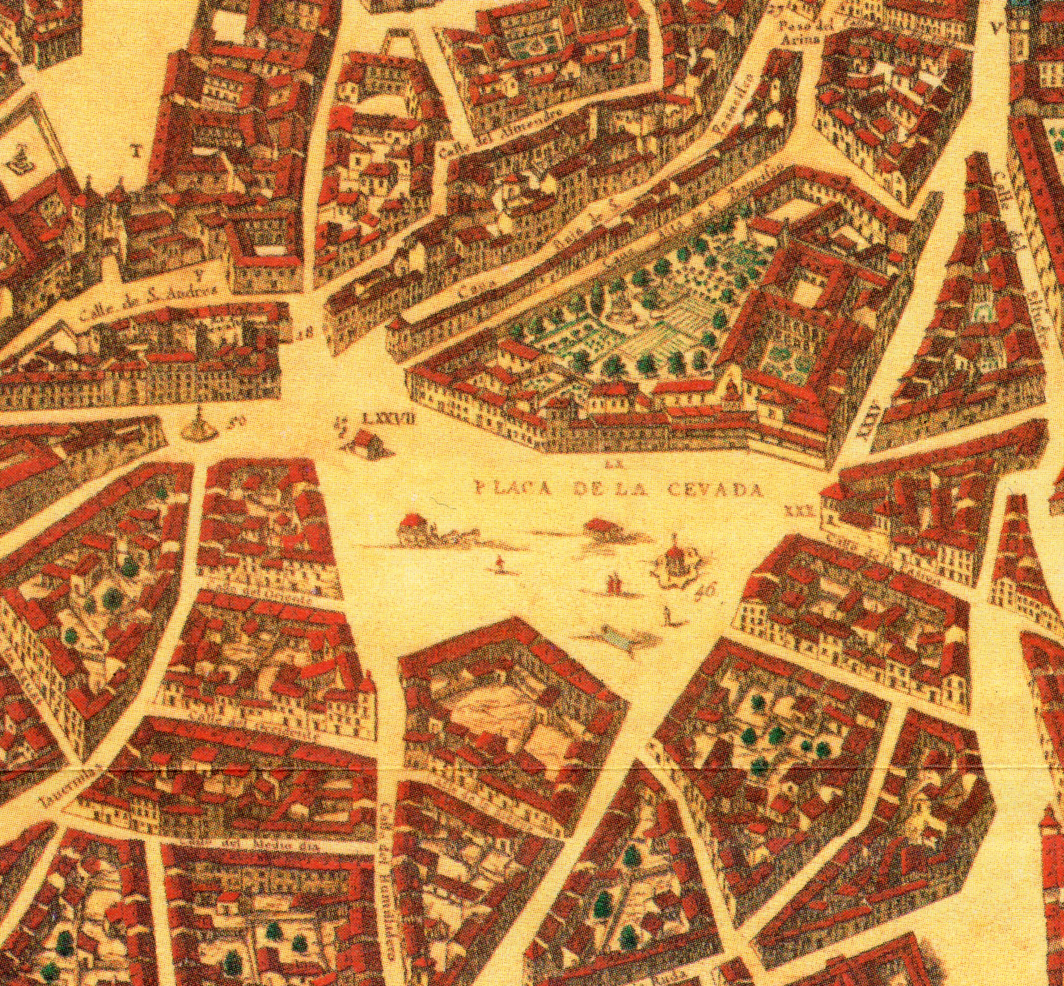 Topografía de la Villa de Madrid descrita por Don Pedro Texeira en 1656, en la cual se demuestran todas las calles al largo y ancho de cada una de ellas, las rinconadas y lo que tuercen las Plazas, fuentes, jardines y huertas con la disposición que tienen las parroquias, Monasterios y Hospitales están señalados sus nombres con letras y números que se hallaran en la tabla y los demás edificios, torres y delanteras de las casas de la parte que mira al Mediodía están sacadas al natural que se podrán tocar las puertas y ventanas de cada una de ellas. A la derecha de la Plaza de la Cebada, identificada con el número 46, se ha dibujado la fuente de la Abundancia, y a la izquierda, con el número 50, la fuente de la plaza de Puerta de Moros.